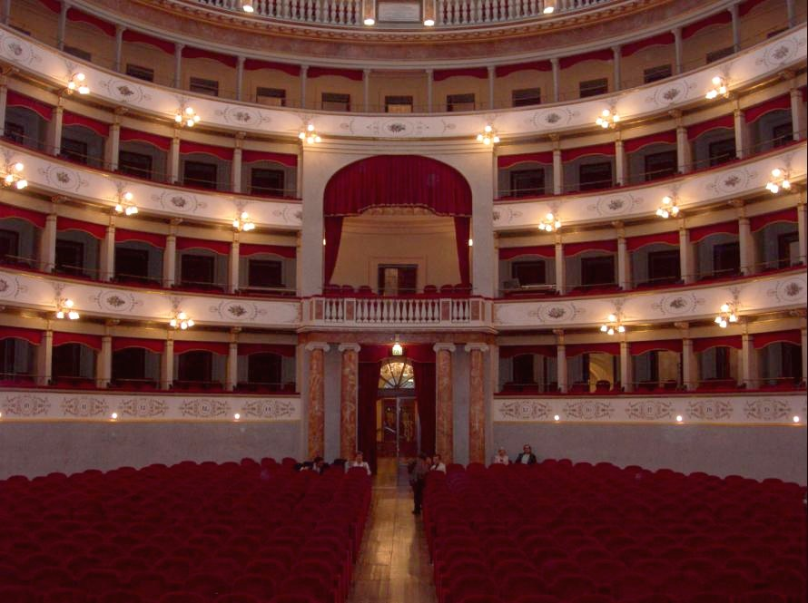 Livorno: il Teatro Goldoni, progettato da Giuseppe Cappellini e inaugurato nel 1847. Interno della "Sala grande", dopo il restauro del 2004.